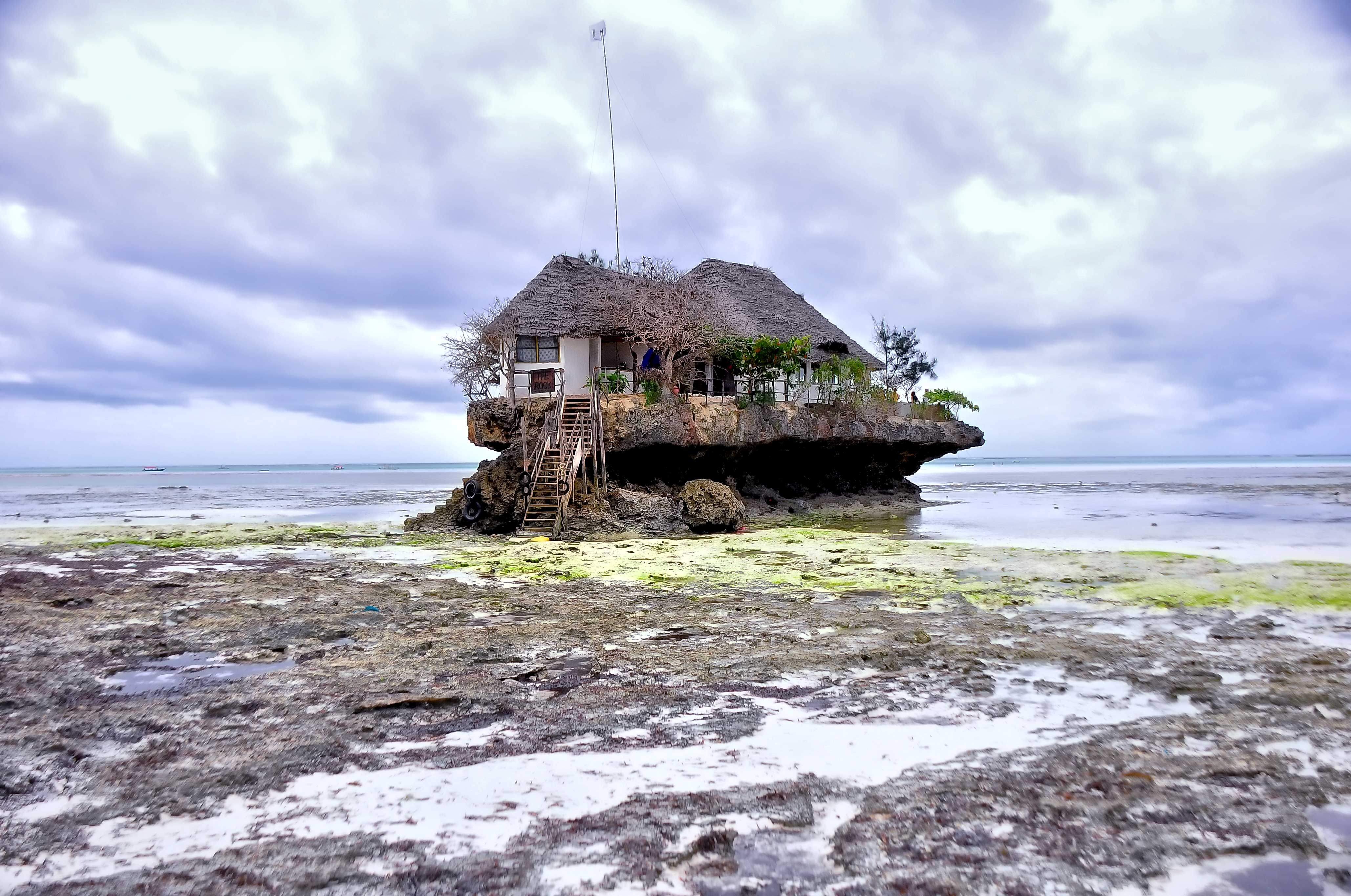 The Rock Restaurant, Zanzibar